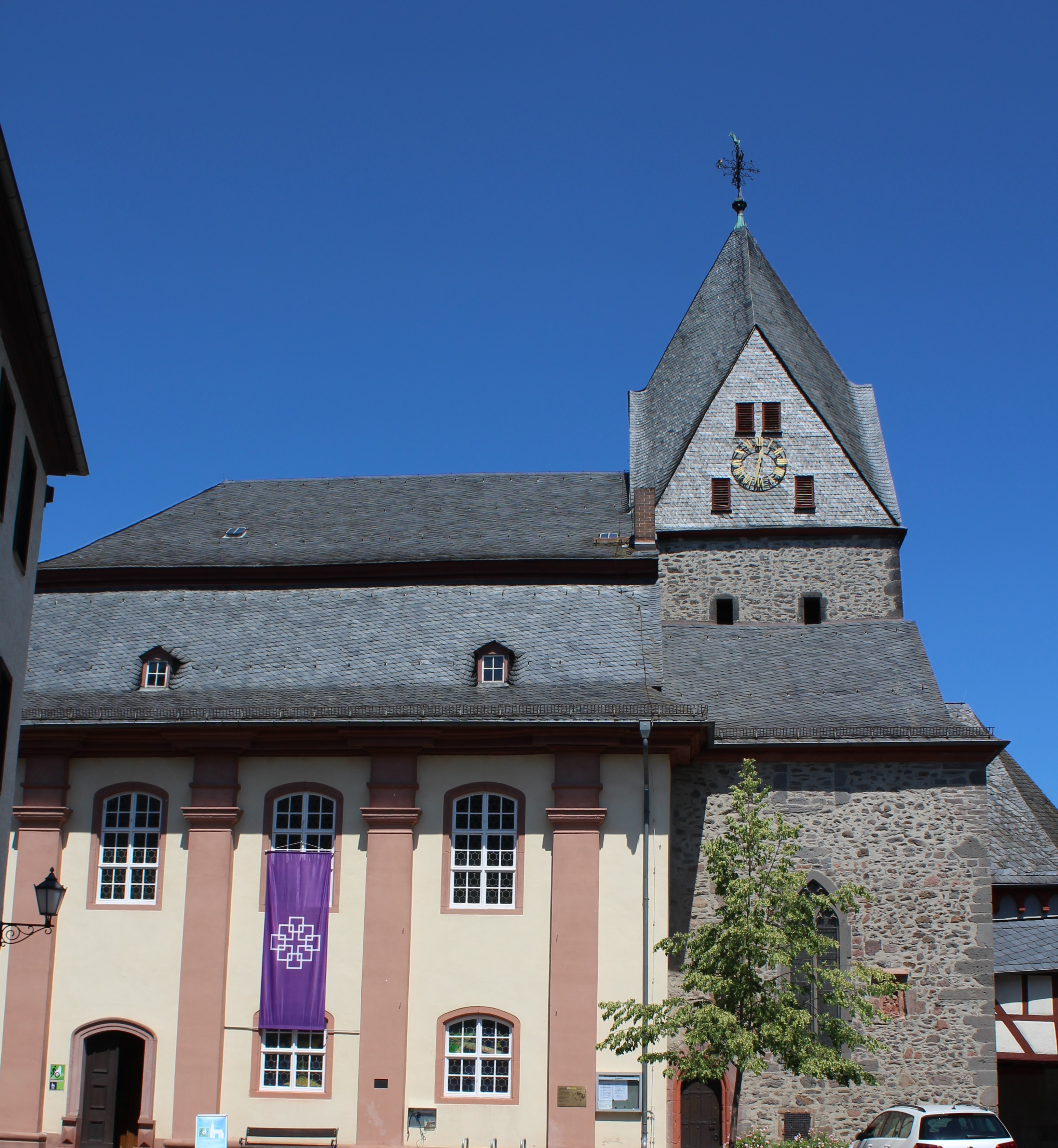 Evangelische Stadtkirche Laubach, Landkreis Gießen, Hessen, Deutschland